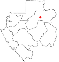 Разположение на Макоку в Габон.